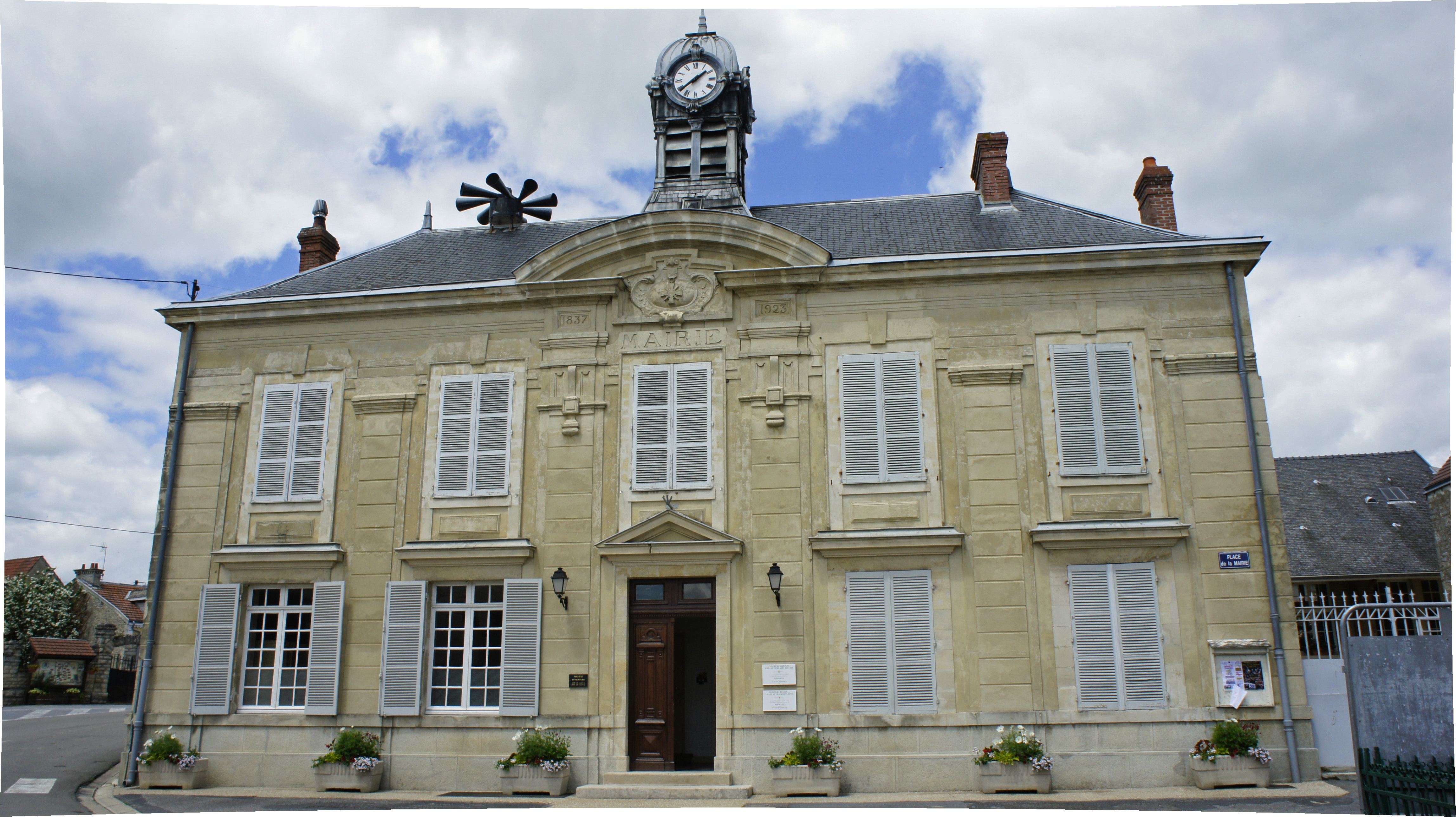 Hôtel de ville à Pouillon.